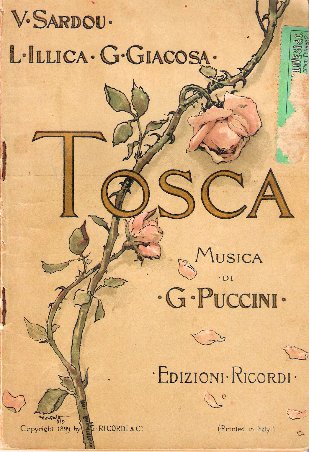 Foto di vecchio libretto